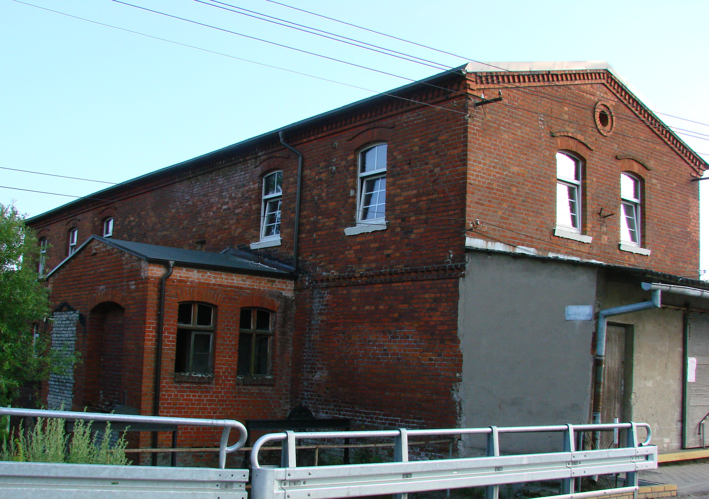 Dawny Młyn przy rzece Sępolnie (Sępolence), na Starym Mieście, ul. Młyńska. Obiect in Sępólno Krajeńskie, Poland.